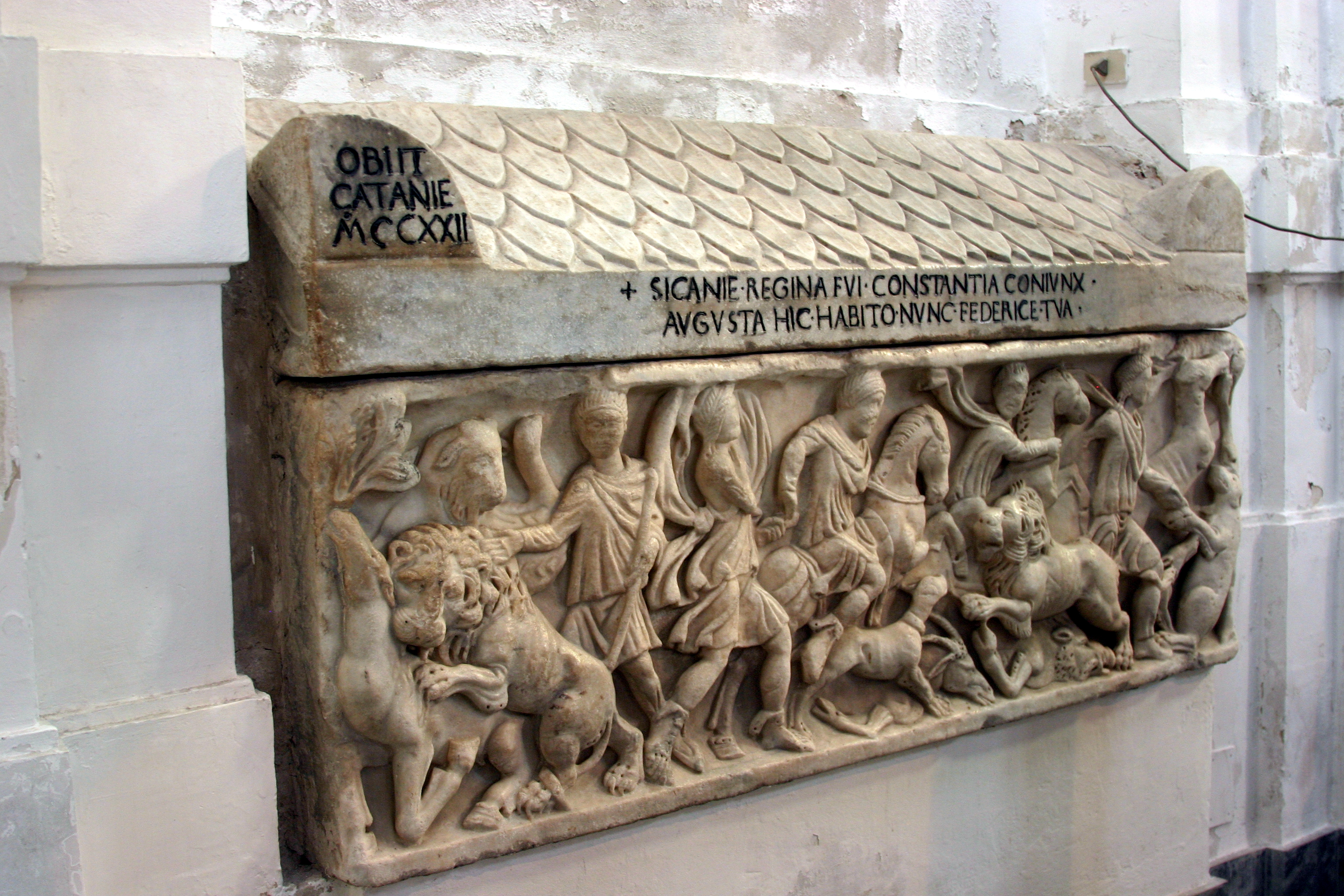 Cathedral of Palermo